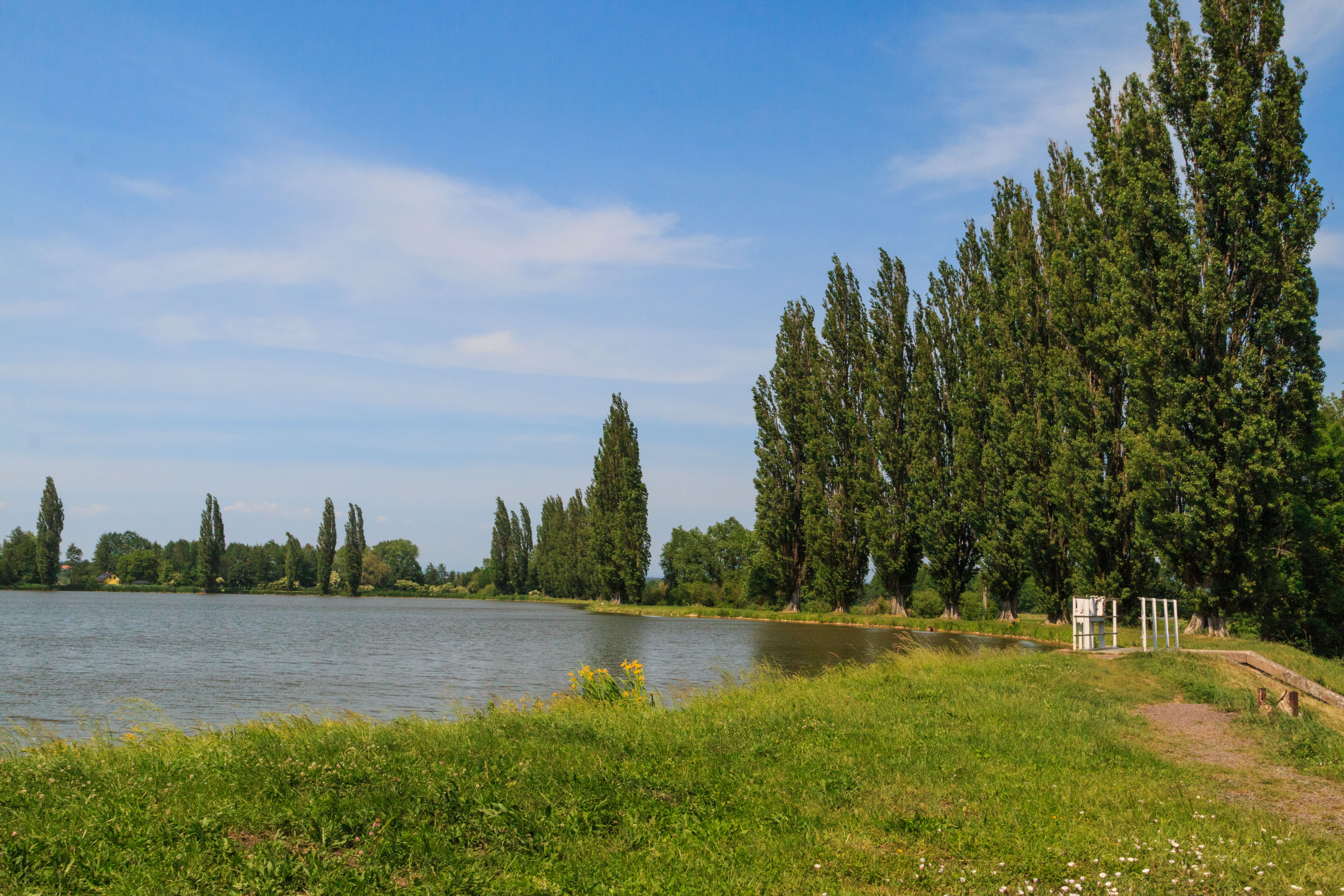 Vysokoveselský rybník Project: Vodstvo.